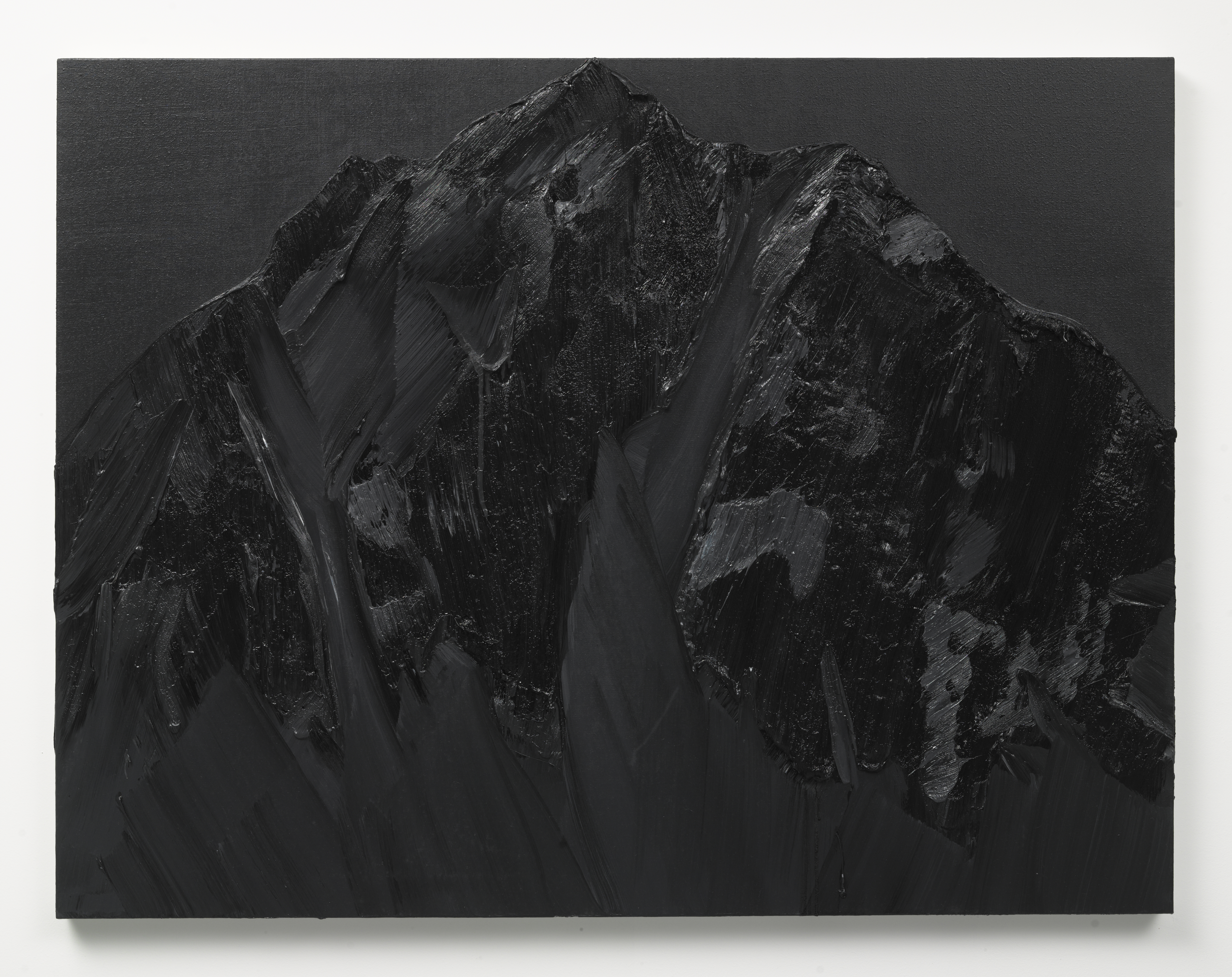 Conrad Jon Godly: Dunkel #19, 2011, Öl auf Leinwand.